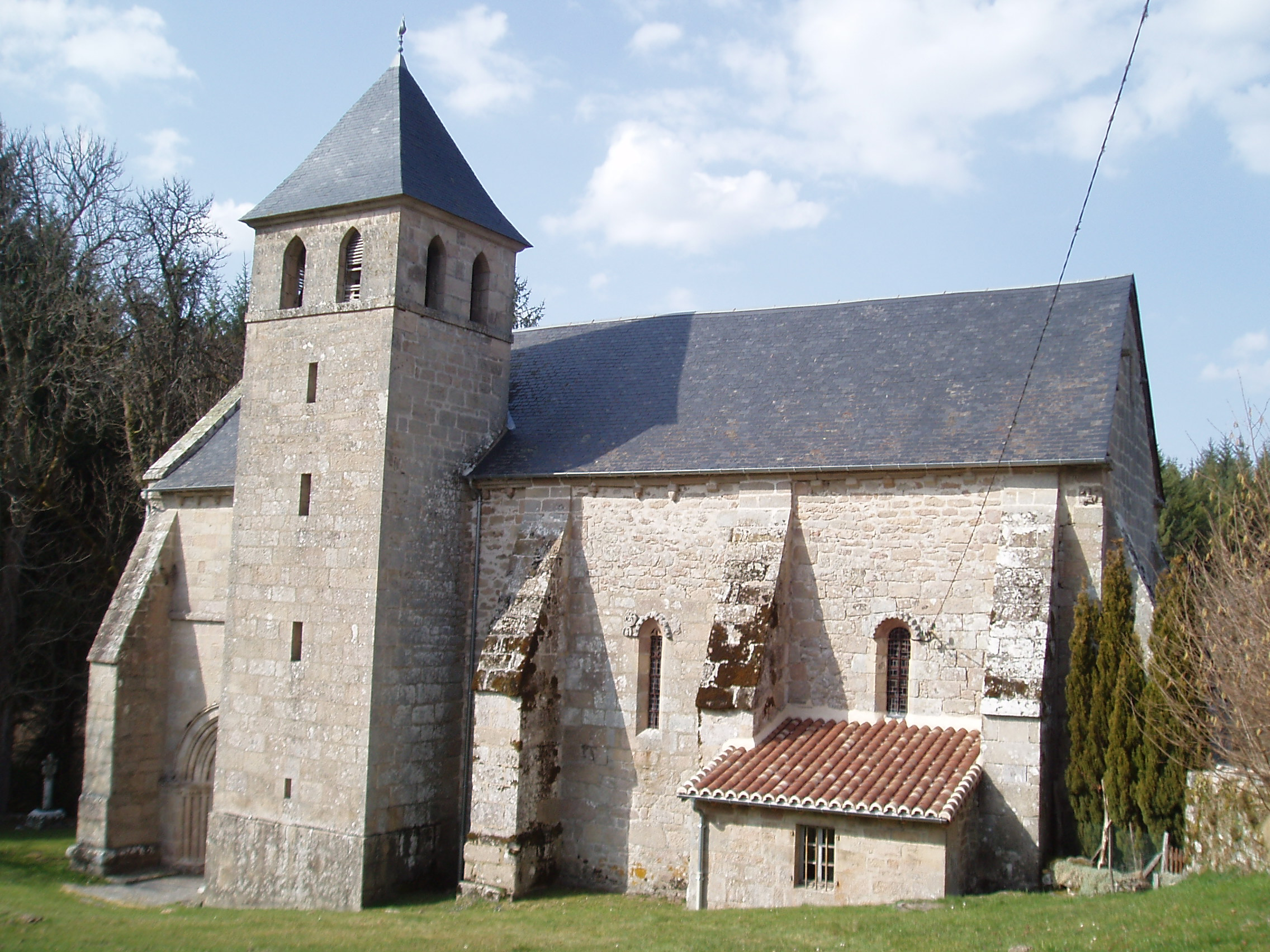 Eglise